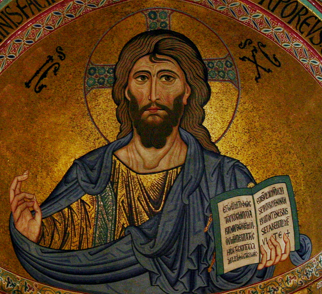 Cathedral of Cefalù